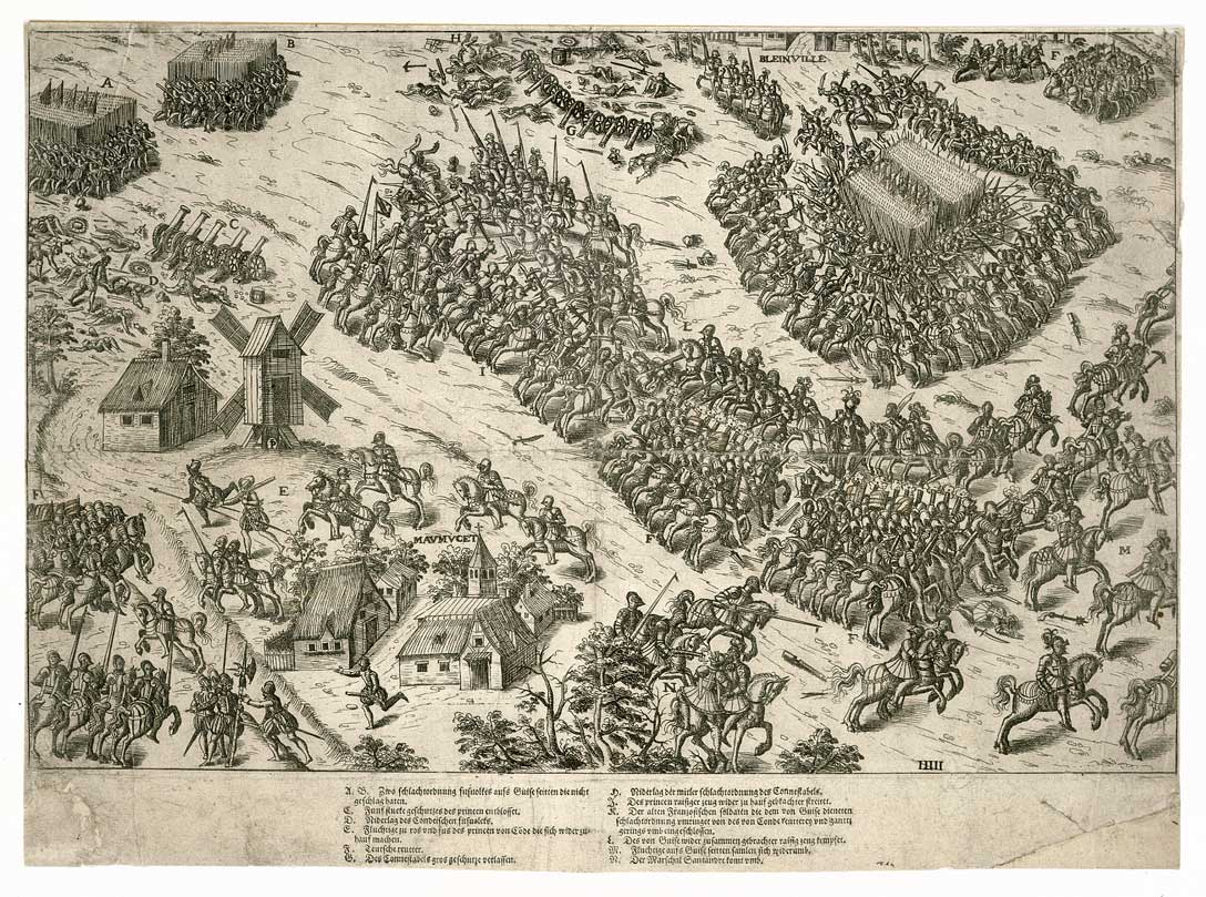 Gravure, représentant la quatrième charge pendant la bataille de Dreux. La gravure est une traduction en allemand de la gravure de Tortorel et Perrissin, créé en 1570, avec témoignage de soldats présents. Légende en allemand. 1562-12-19